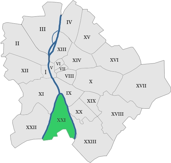 map hungary budapest district 21